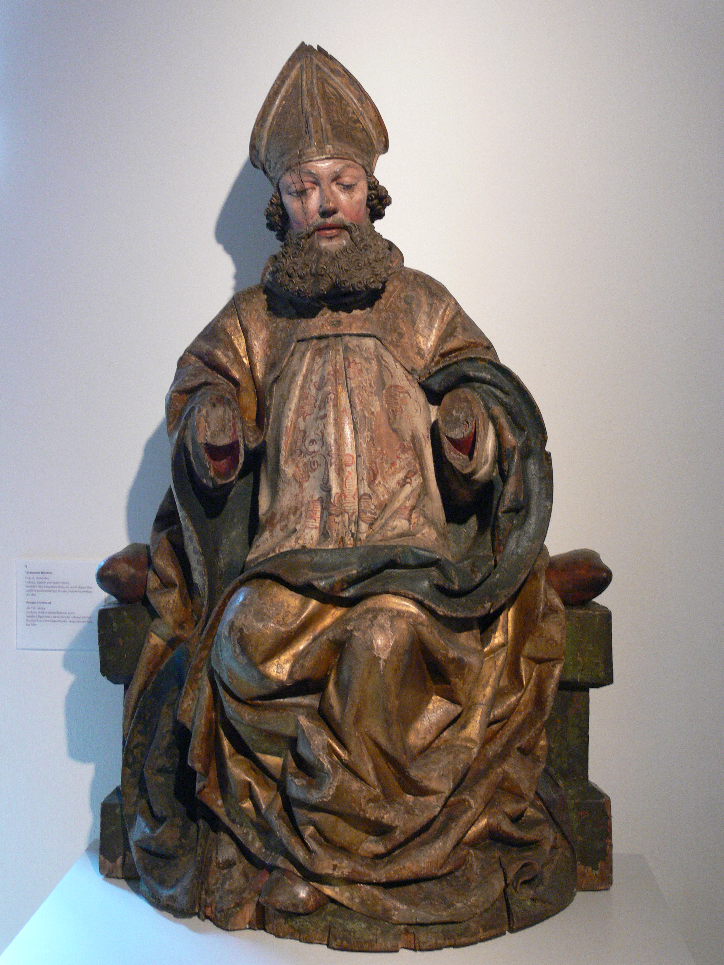 Thronenender Nikolaus, Ende 15. Jh., Laubholz mit originaler Fassung vermutlich aus einem Altarschrein aus dem Freiberger Dom Staatliche Kunstsammlungen Dresden, Skulpturensammlung, SAV 1859 (ausgestellt im Schloßbergmuseum Chemnitz)